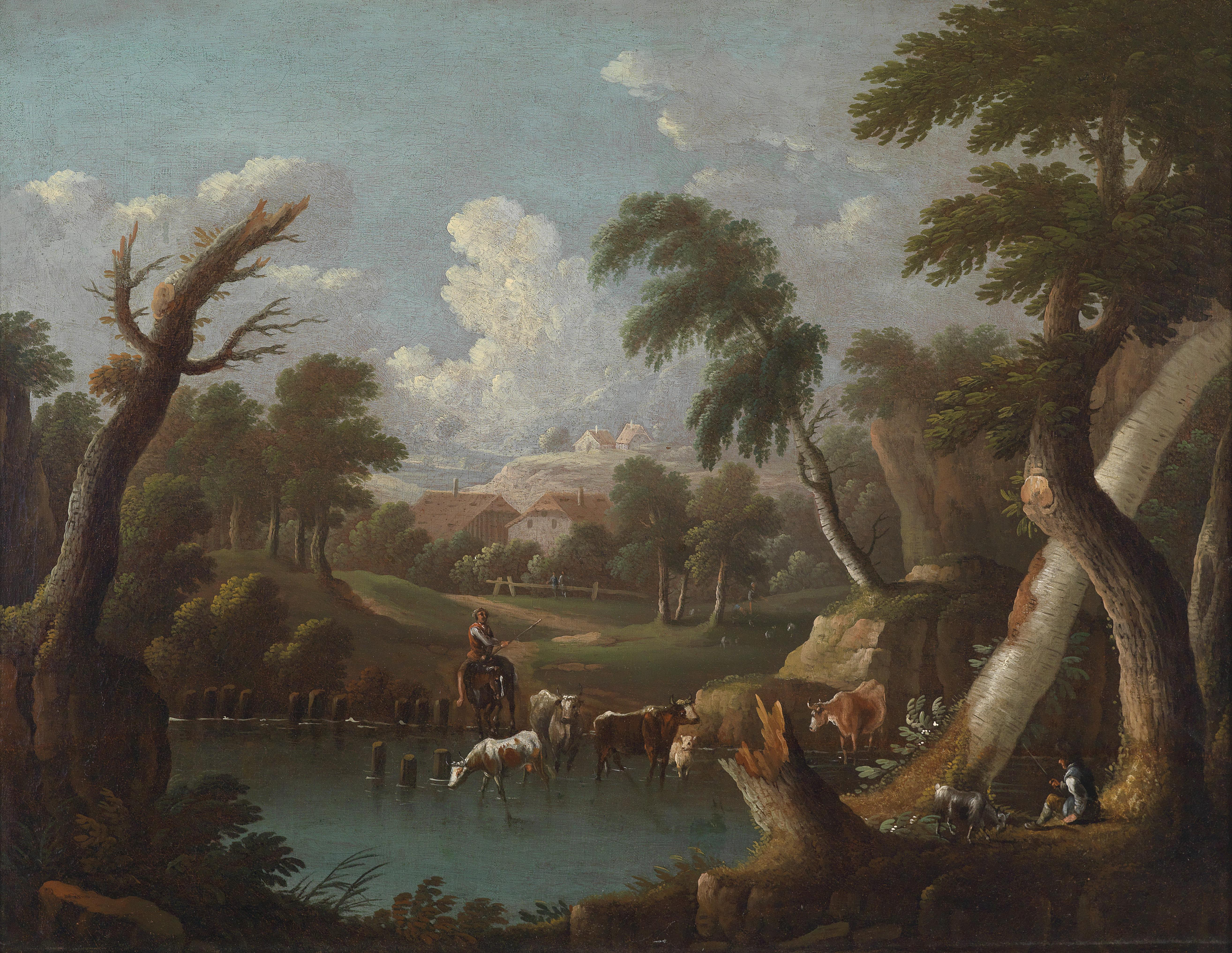 Bergige Landschaft mit trinkendem Vieh an einem Tümpel, Öl auf Leinwand, 49 x 63,5 cm